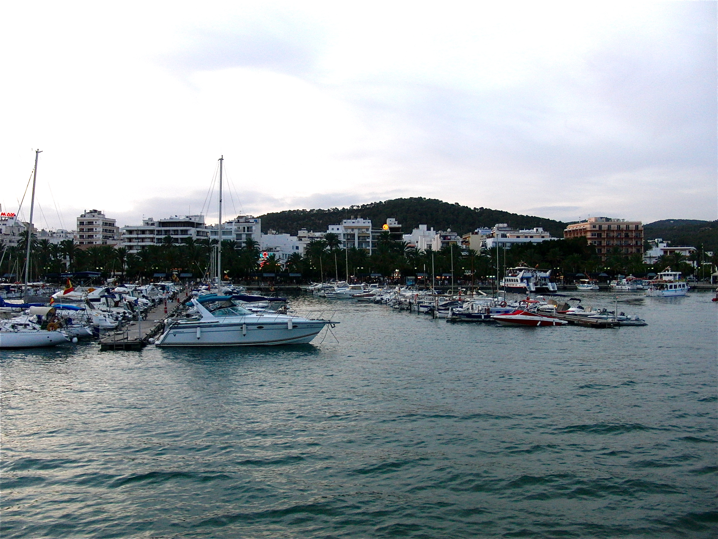 Ansicht von Sant Antoni de Portmany, Ibiza, Spanien